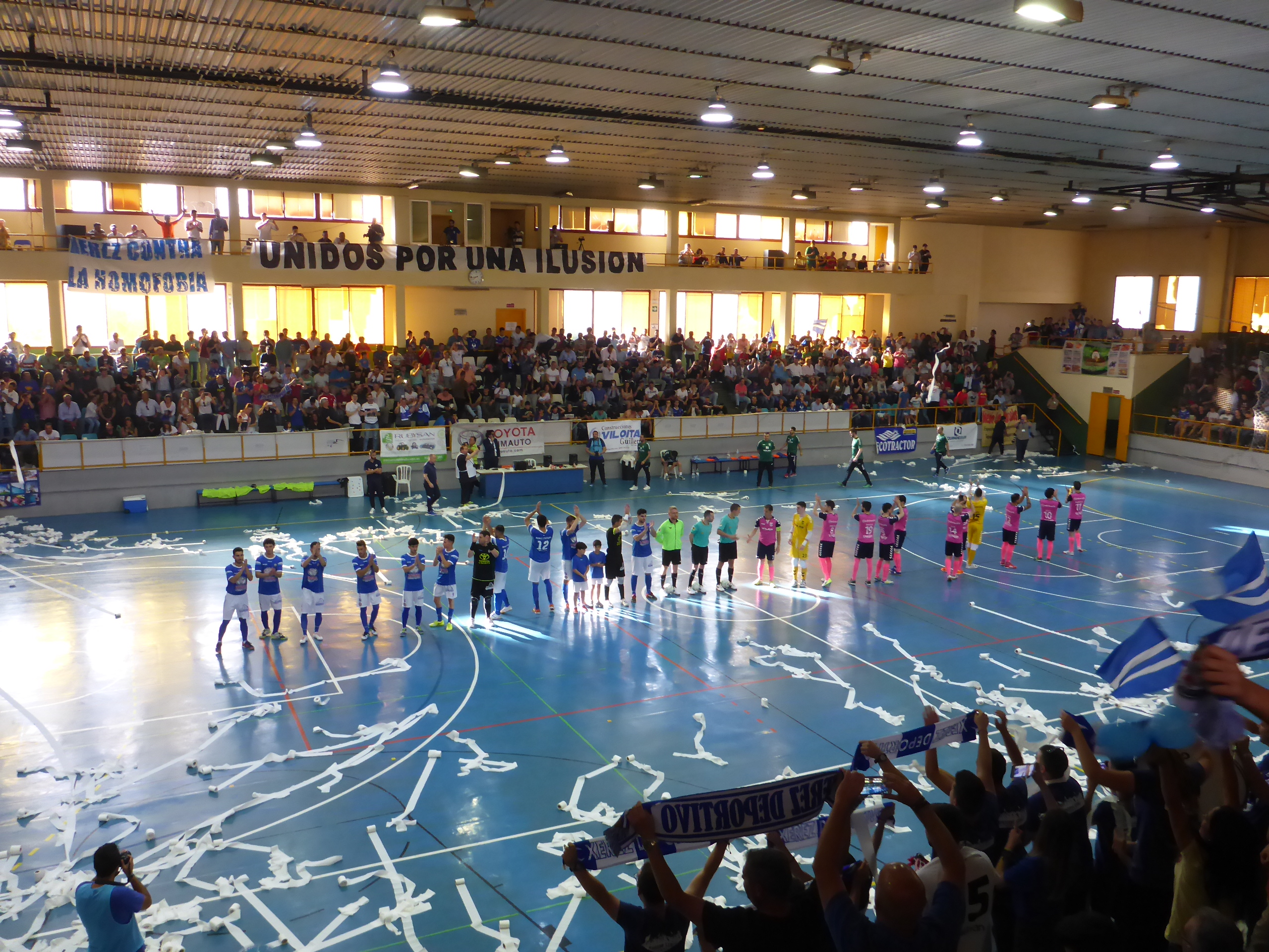 Partido de vuelta de la promoción de ascenso a Segunda División de Fútbol Sala Española entra Xerez DFC y Talavera (Jerez de la Frontera)